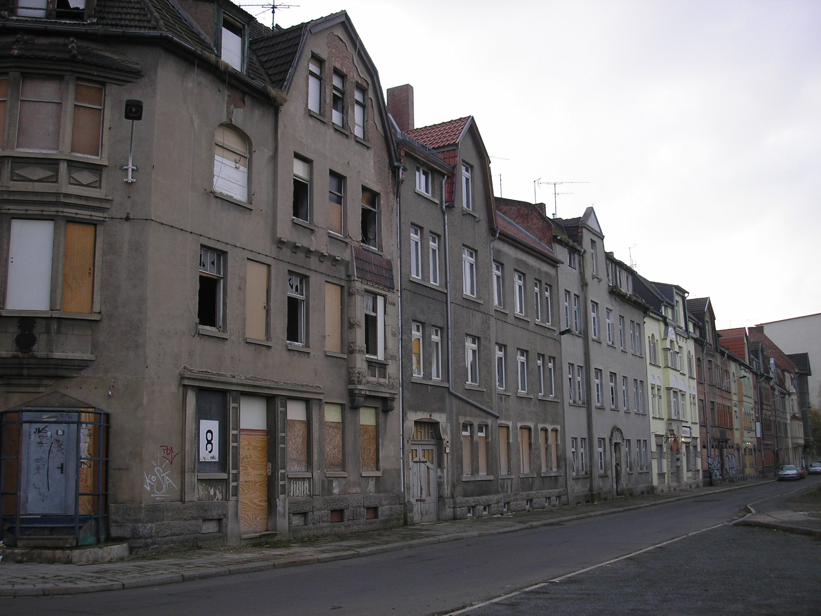 Metallstraße, Erfurt (Ilversgehofen)